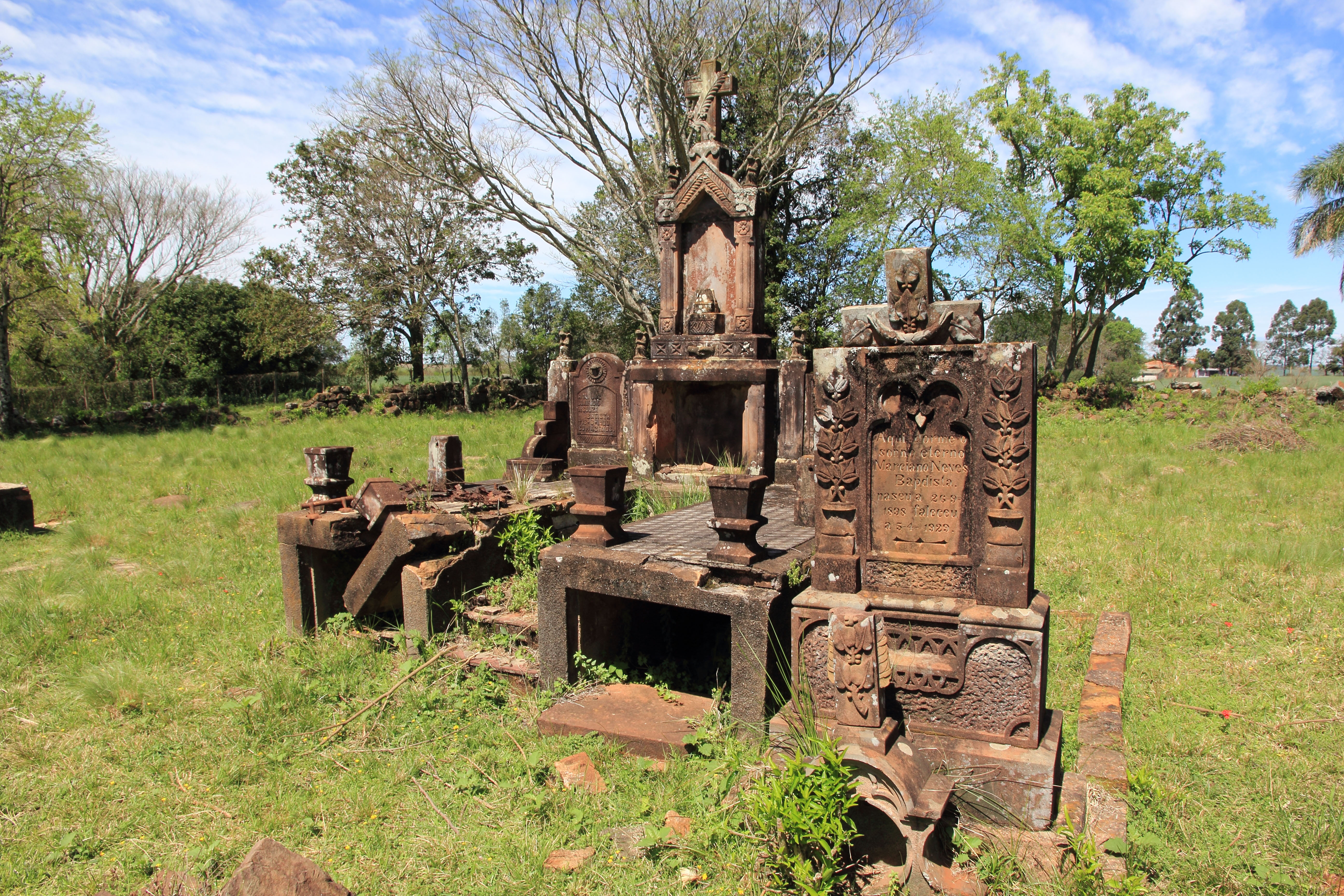 Sítio Arqueológico de São Lourenço Mártir localizado em São Luiz Gonzaga, RS.